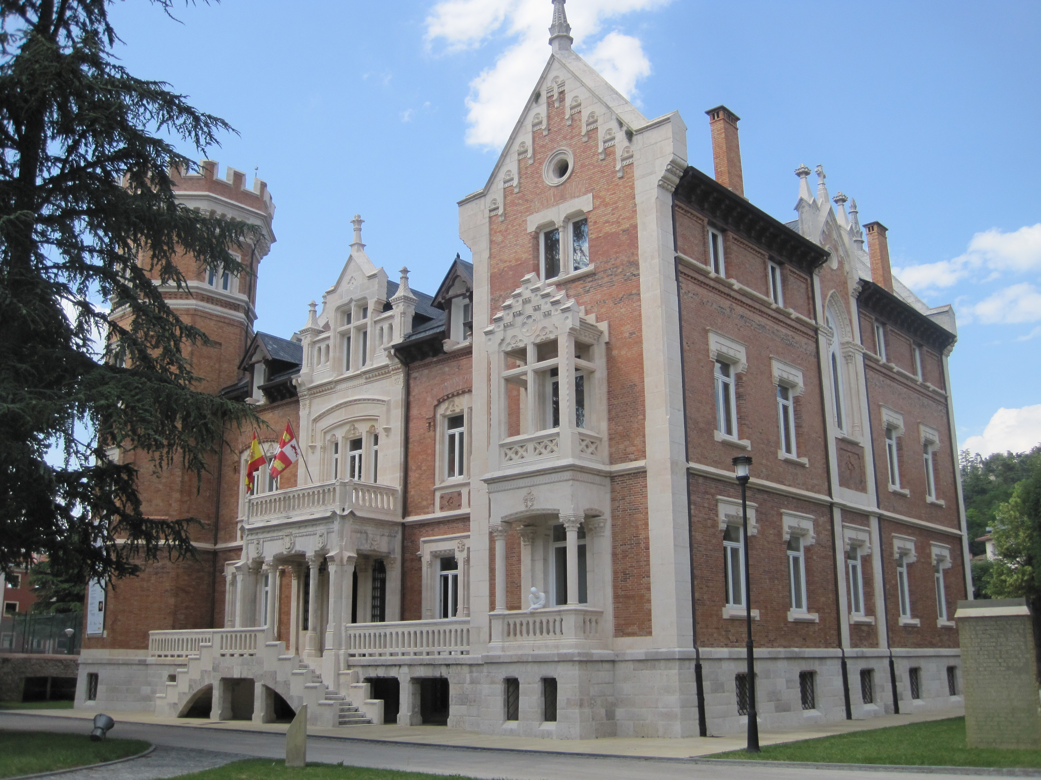 Vista lateral del Palacio de la Isla.